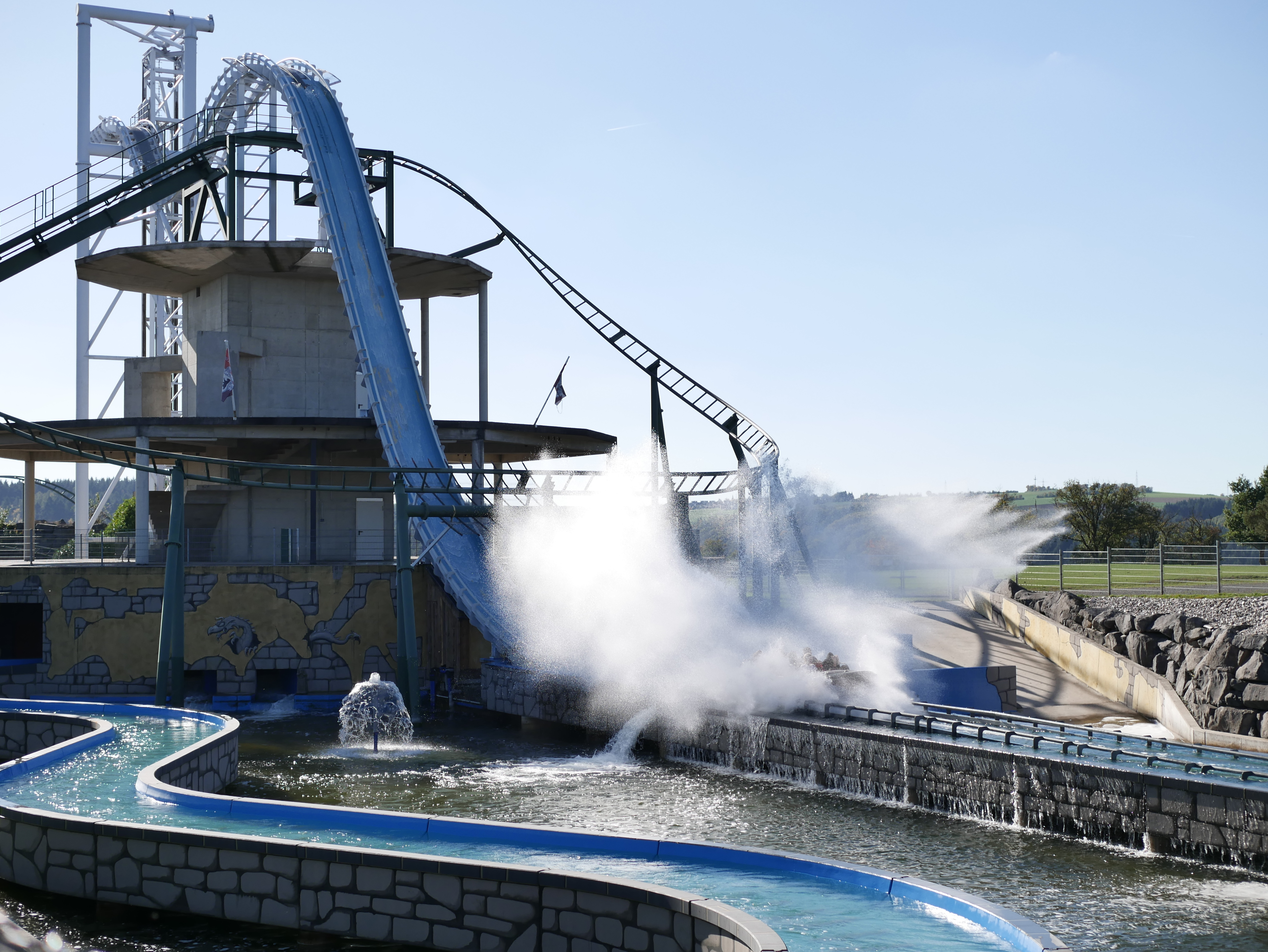 Splashdown